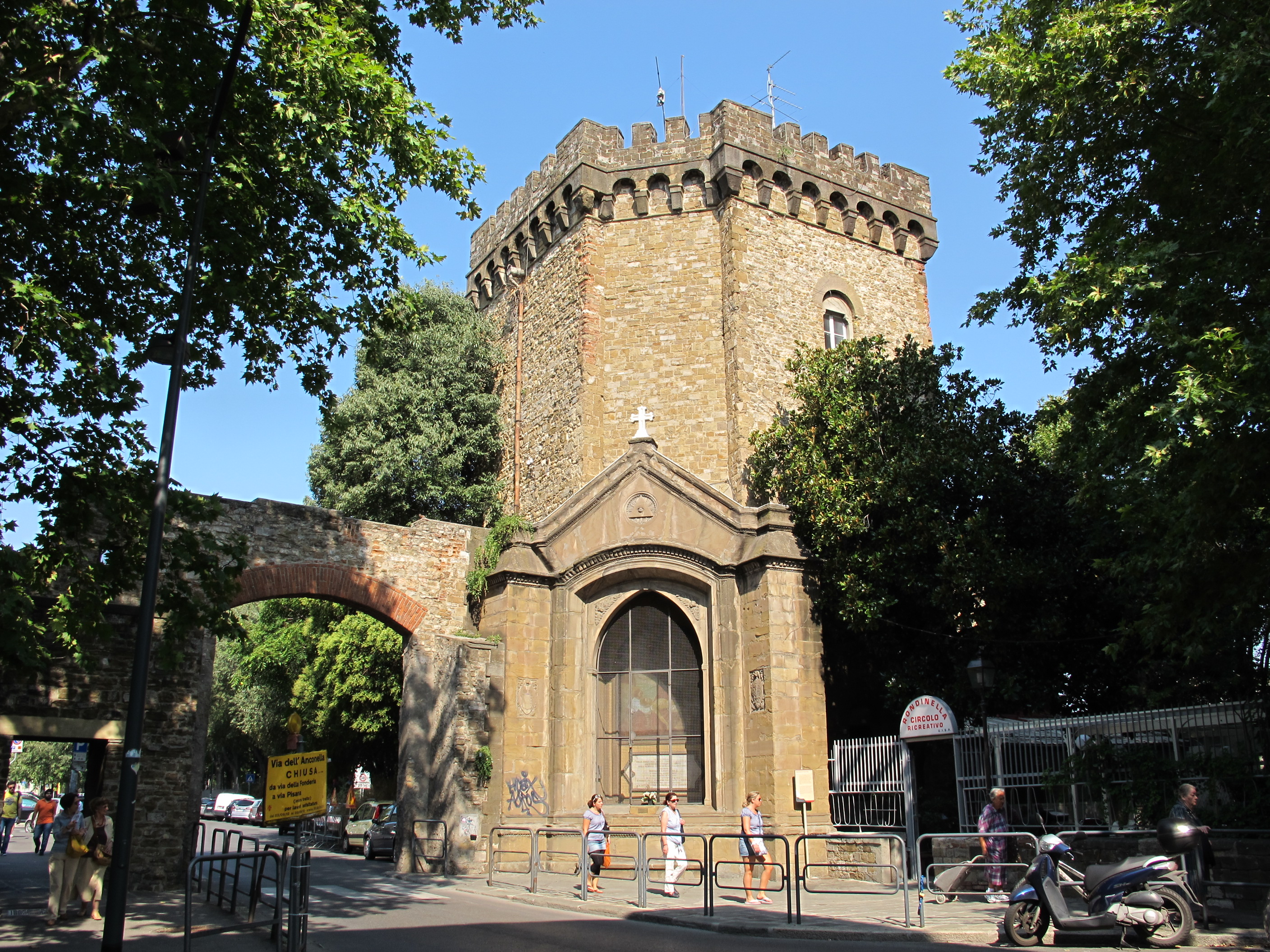 Torrino di santa rosa